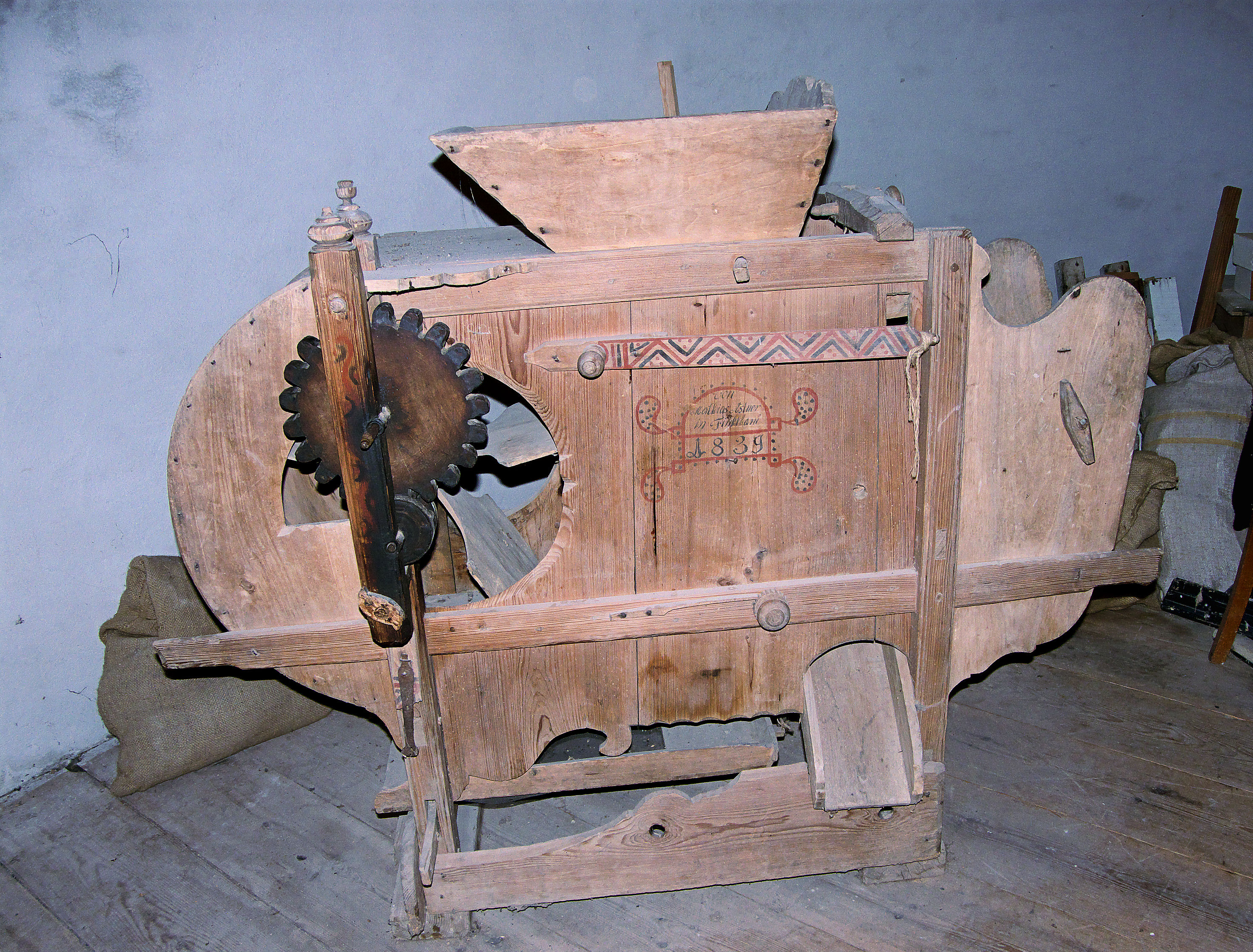 Duitse handwanmolen uit 1839